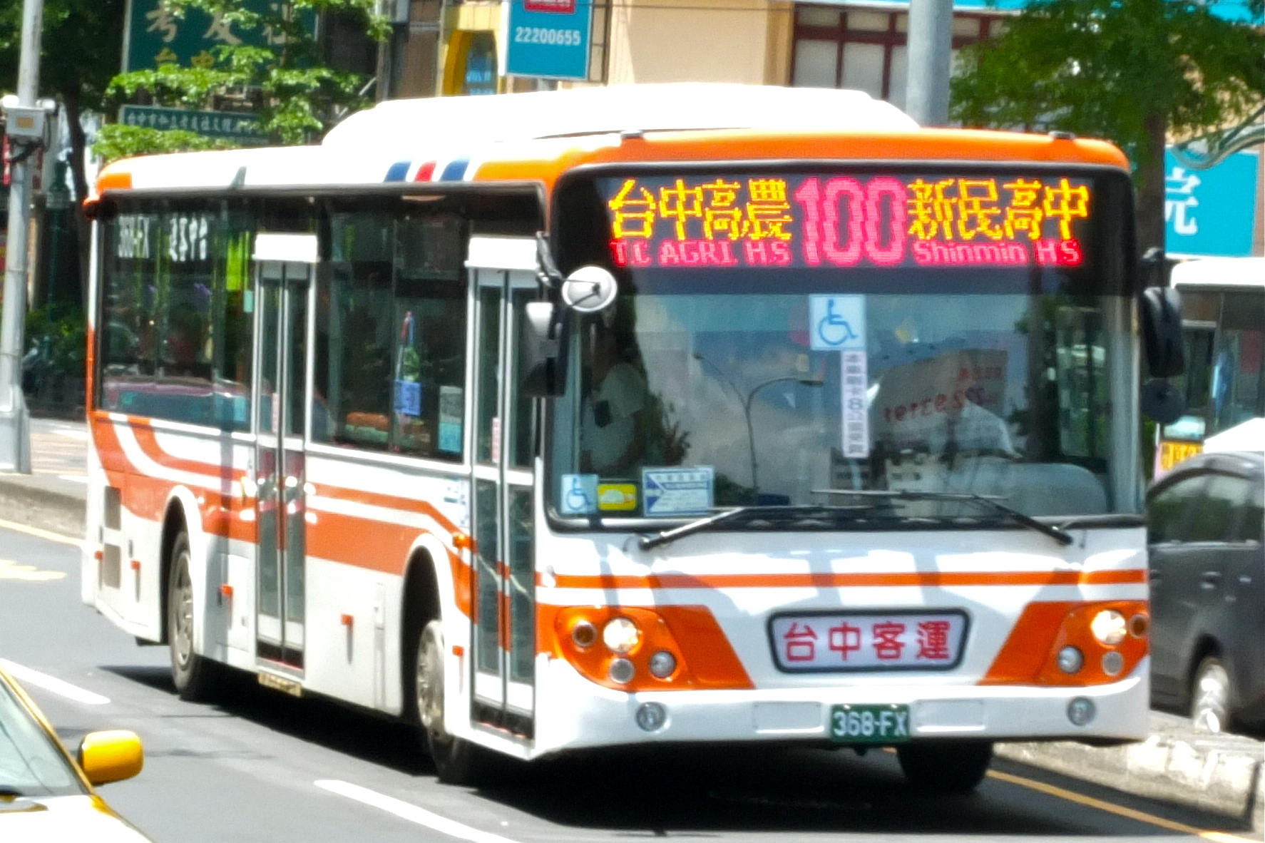 台中客運DAEWOO BS120CN大客車368-FX營運台中市公車35路，行駛於台中市建國路。